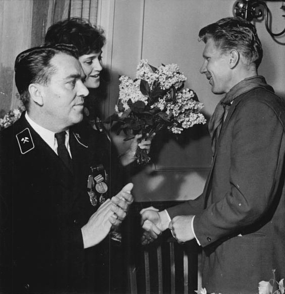 Friedensfahrt, Chemnitz, Fahrerehrung, Petrow Zentralbild 12.5.1961 XIV. Internationale Friedensfahrt Warschau -Berlin Prag 1961. Mit einem dreifachen Hoch wurden am 12.5.1961 die sowjetischen Friedensfahrer am Ruhetag in Karl-Marx-Stadt im Kulturpalast der Werktätigen empfangen. Über 1000 Karl-Marx-Städter hatten sich eingefunden, um das sowjetische Team, das einer Einladung der SDAG Wismut gefolgt war, mit geradezu überschwenglichen Jubel zu empfangen. UBz: Der mit dem Orden "Banner der Arbeit" ausgezeichnete Bergmann Walter Pilz von der SDAG Wismut im freundschaftlichen Gespräch mit dem sowjetischen Fahrer Petrow (rechts).